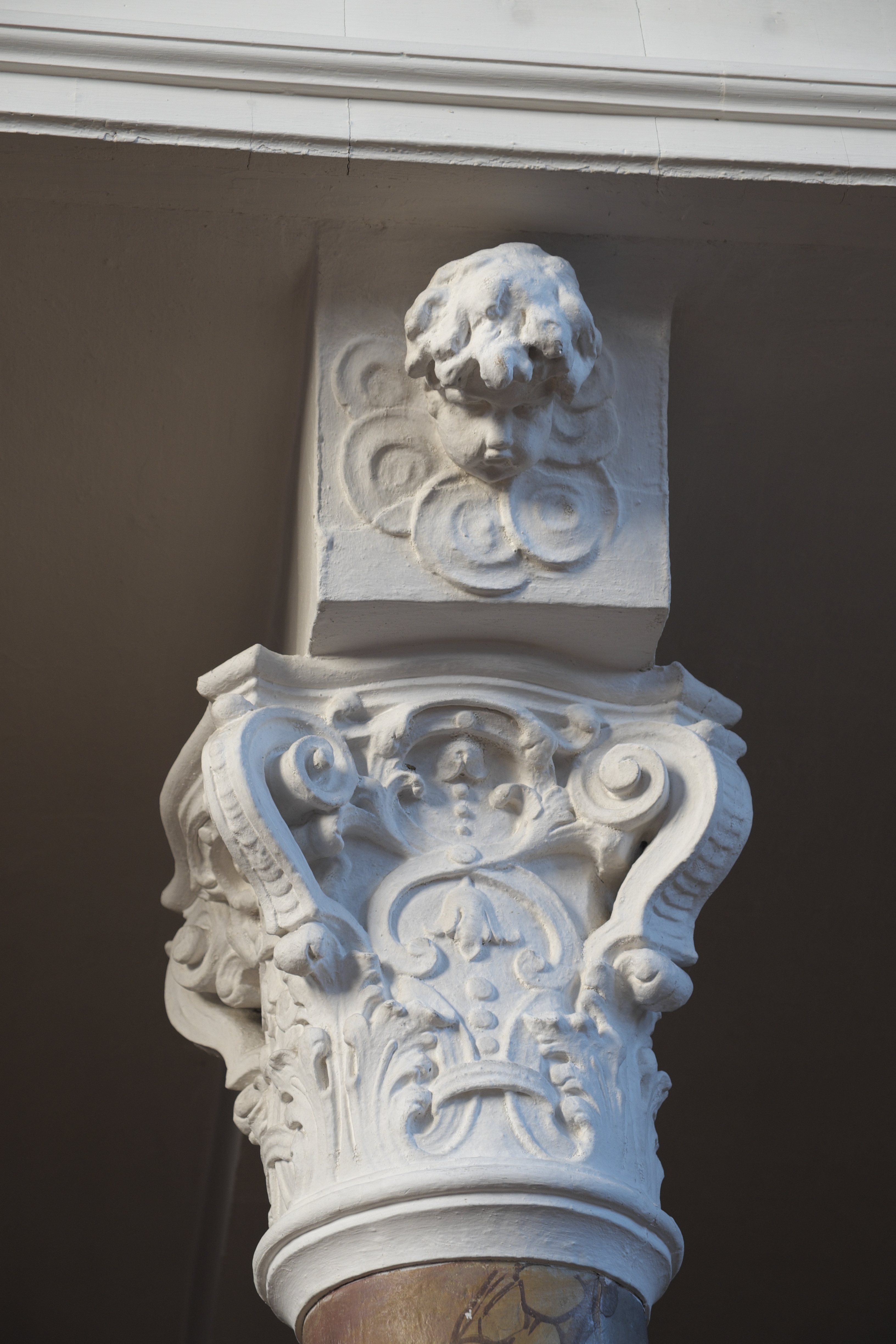 Katholische Kirche St. Andreas in Gremheim, einem Ortsteil von Schwenningen, Kapitell einer Säule unter der Orgelempore